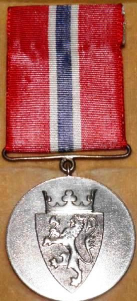 Medaljen for redningsdåd er en norsk medalje opprettet 27. januar 1944 av Sjøfartsdepartementets Sjøfartskontor etter innstilling fra departementet og ministerpresident Vidkun Quislings vedtak #45 samme dato, som utmerkelse for redningsdåd til sjøs. Medaljen ble utdelt av Sjøfartsdepartementet.